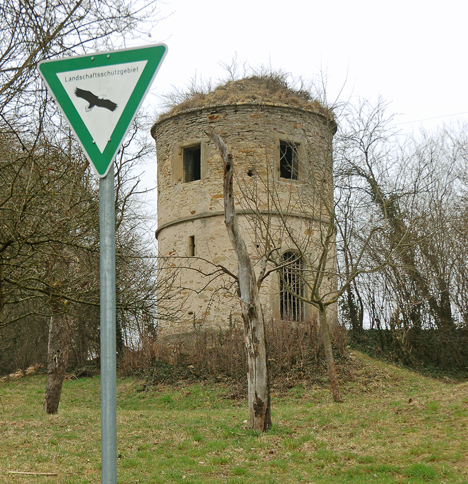 Türmle, auch Mäusetürmle genannt, westl. von Untermberg – 1571 erbaut oder renoviert (Datum überm Eingang). Der Turm gehört zur denkmalgeschützten Sachgesamtheit Burgruine Altsachsenheim und liegt am Rande des Landschaftsschutzgebiets Enztal zwischen dem Leinfelder Hof und Bietigheim-Bissingen im Gewann Ochsental.